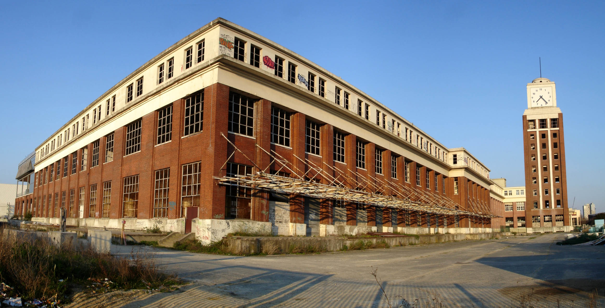 Bobigny (Seine-Saint-Denis), France : Bâtiment de l'ancienne imprimerie de "L'Illustration".